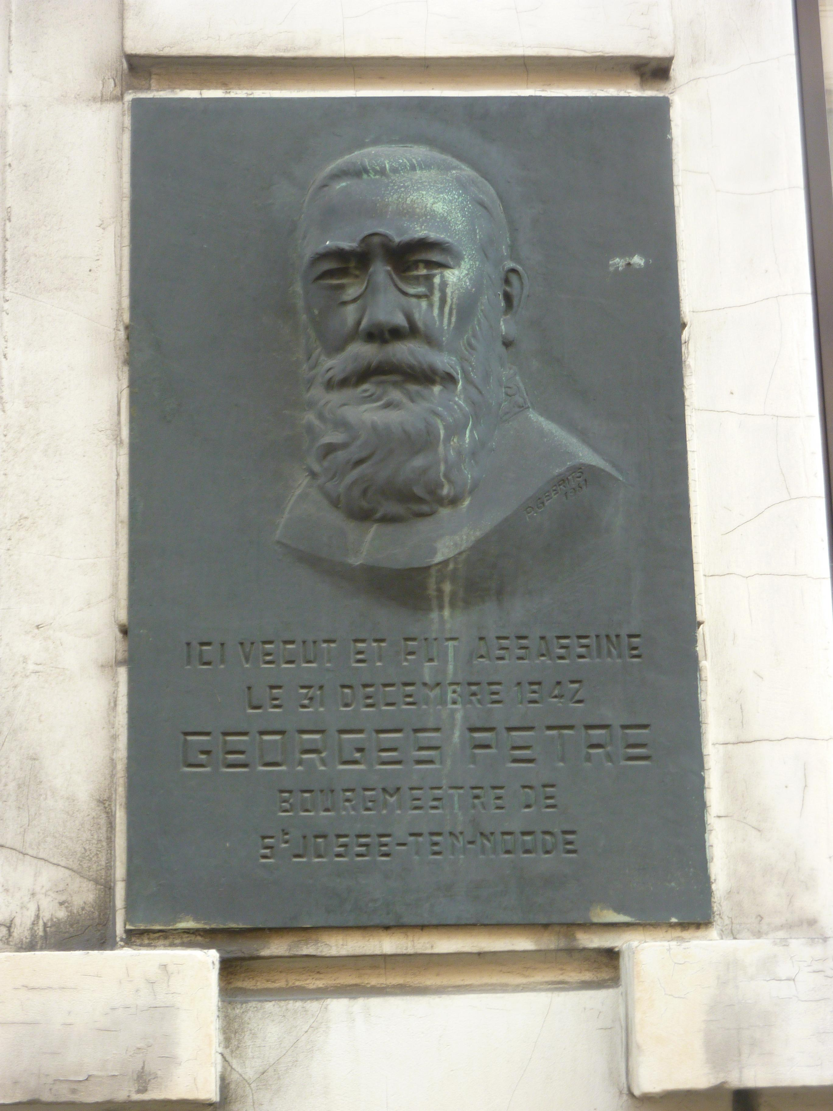 Maison Georges Pètre au n° 52 de la rue Verbist à Saint-Josse-ten-Noode à Bruxelles.